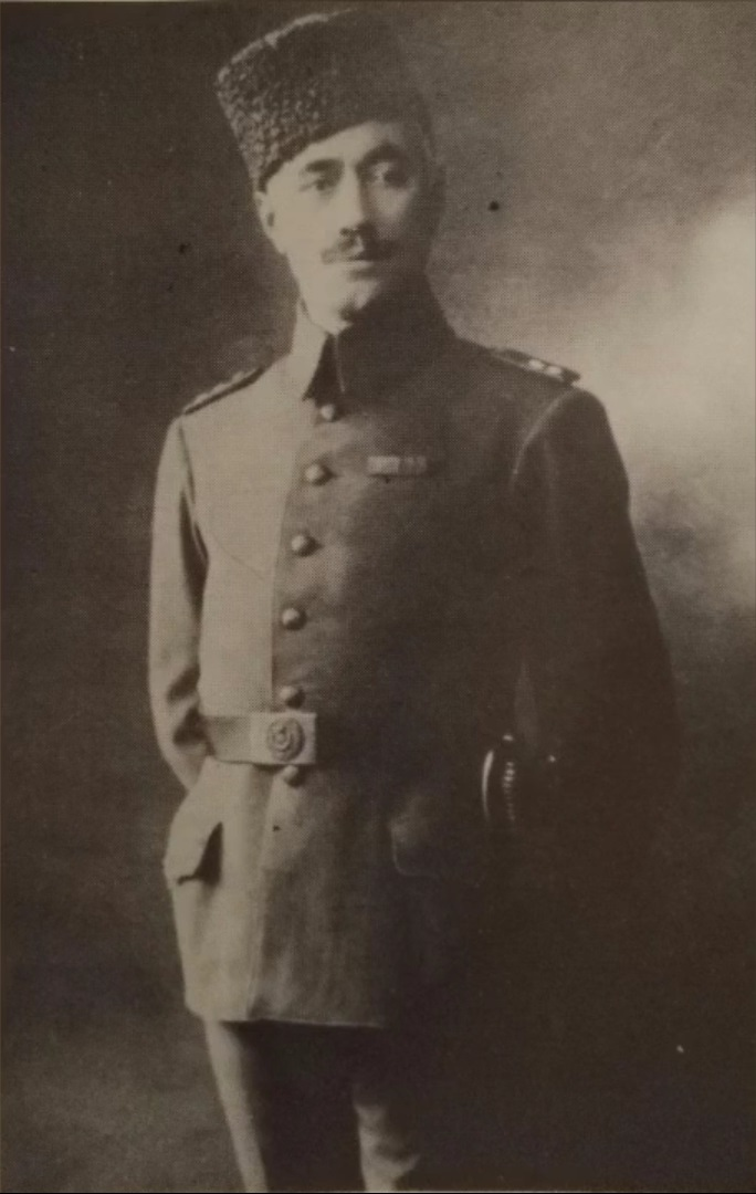 حیدرخان عمو اوغلی از مبارزان مشروطه